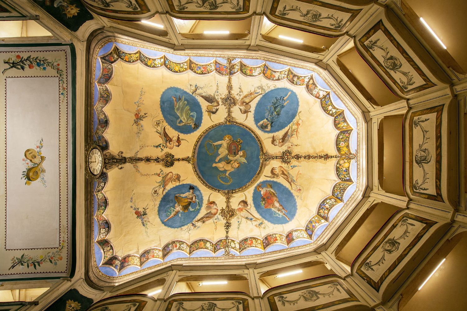 affrescato da Luigi Agretti di appena 14 anni nel 1891